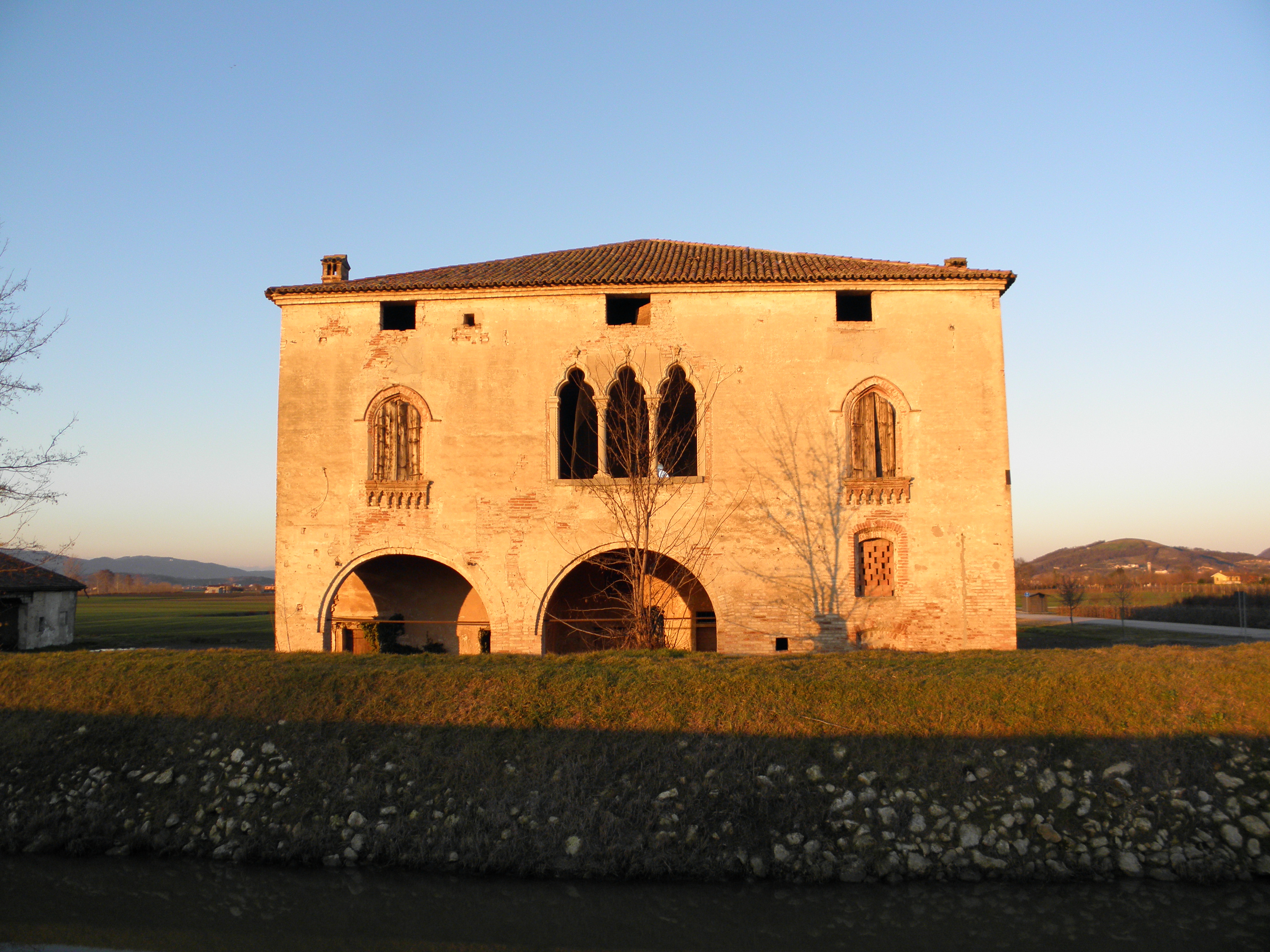 Agugliaro, la quattrocentesca Villa Dal Verme.